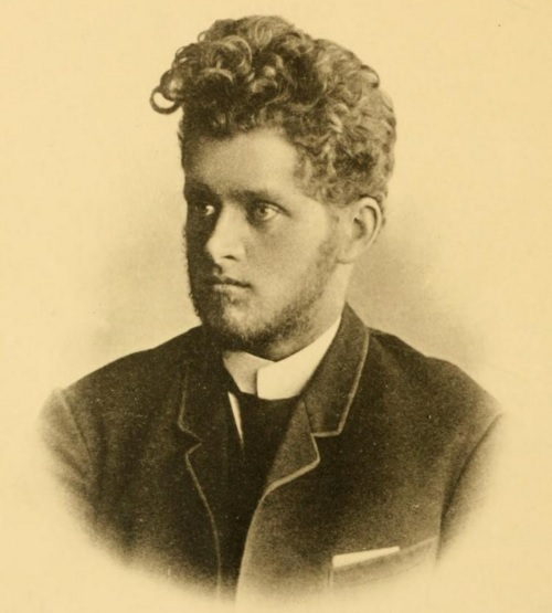 Photo de Dimitri Glazounov Parue dans la Revue d'Entomologie Russe en 1914.